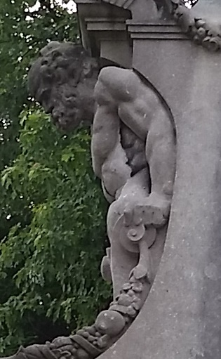 detail Atlant